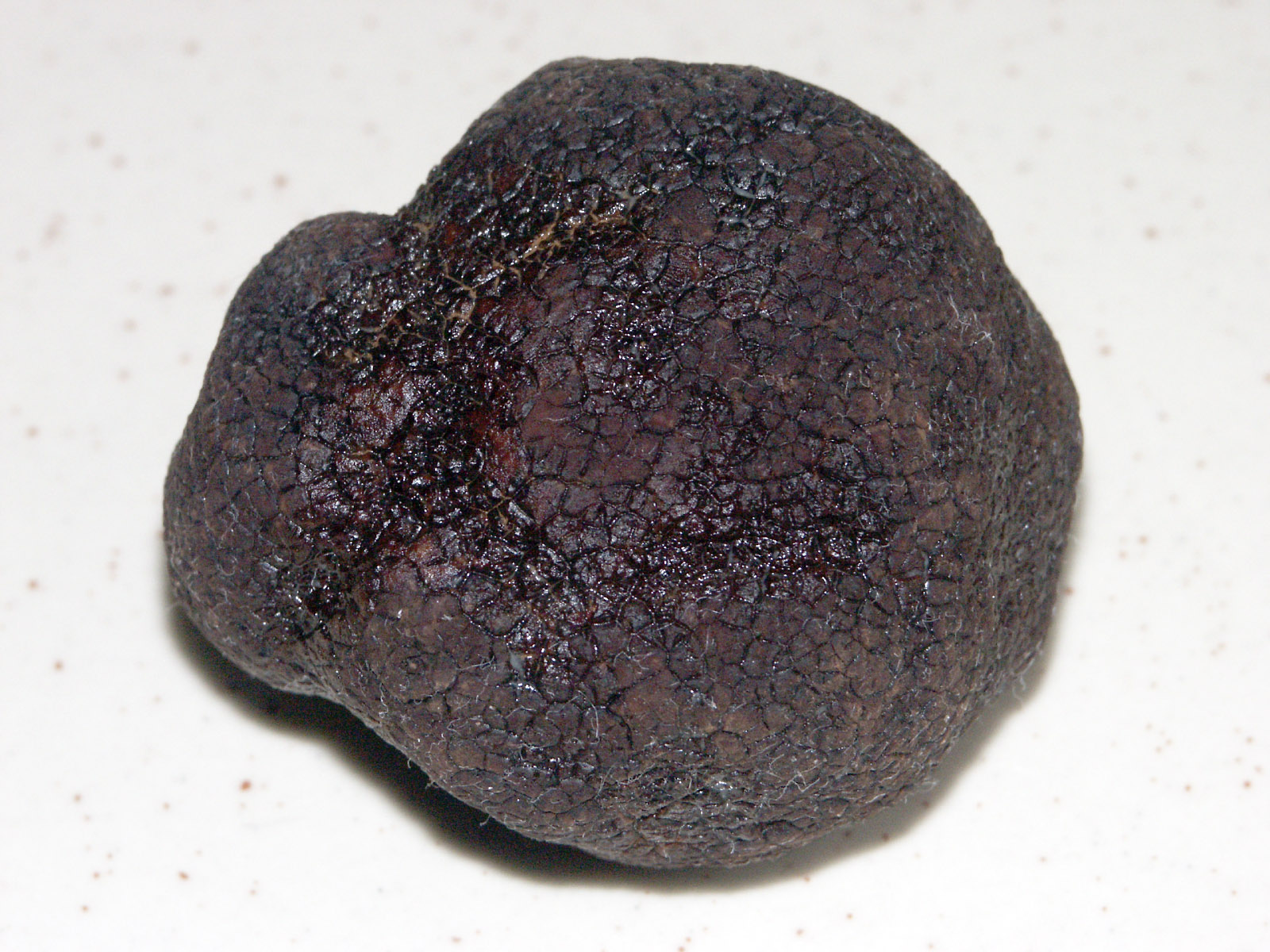 Truffe du Périgord - Récolte 2006